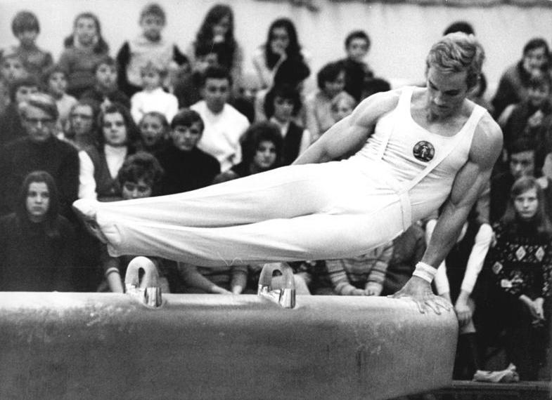 Jürgen Paeke ADN-ZB Liebers-23-4-72 Gera: DDR-Meisterschaften im Turnen - Bei den Finalkämpfen an den einzelnen Geräten (am 22.4.72) wurde Jürgen Paeke (ASK Potsdam) neuer Titelträger am Seitpferd.